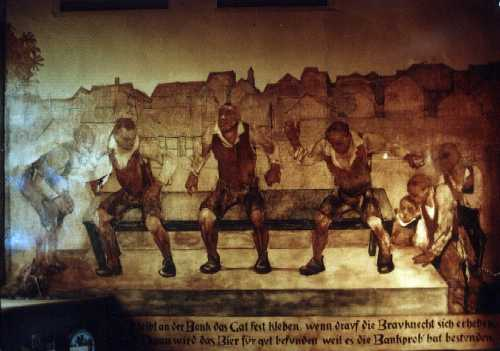 Bierprobe1920 Hans Kohlschein